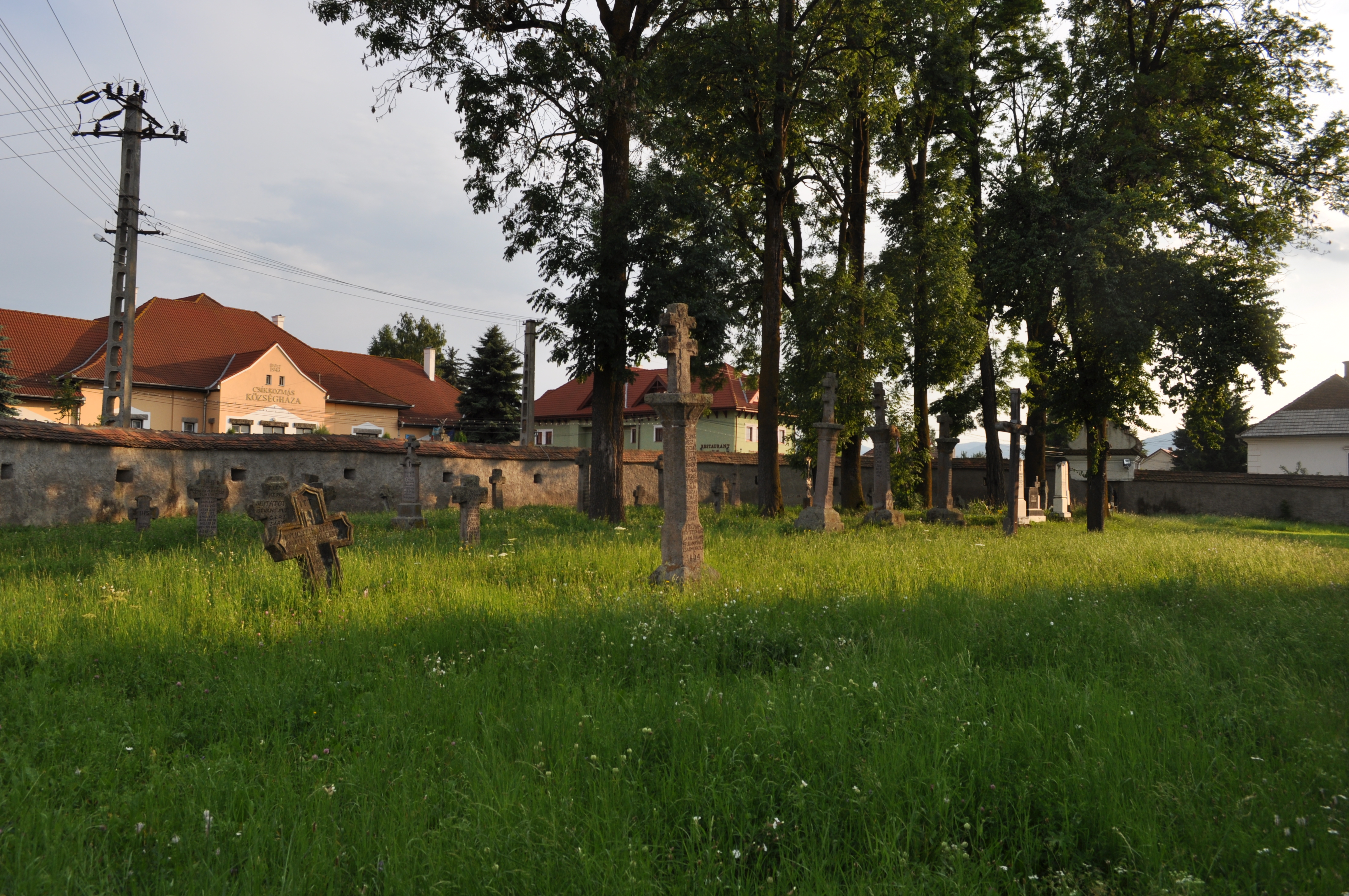 Cozmeni, Harghita